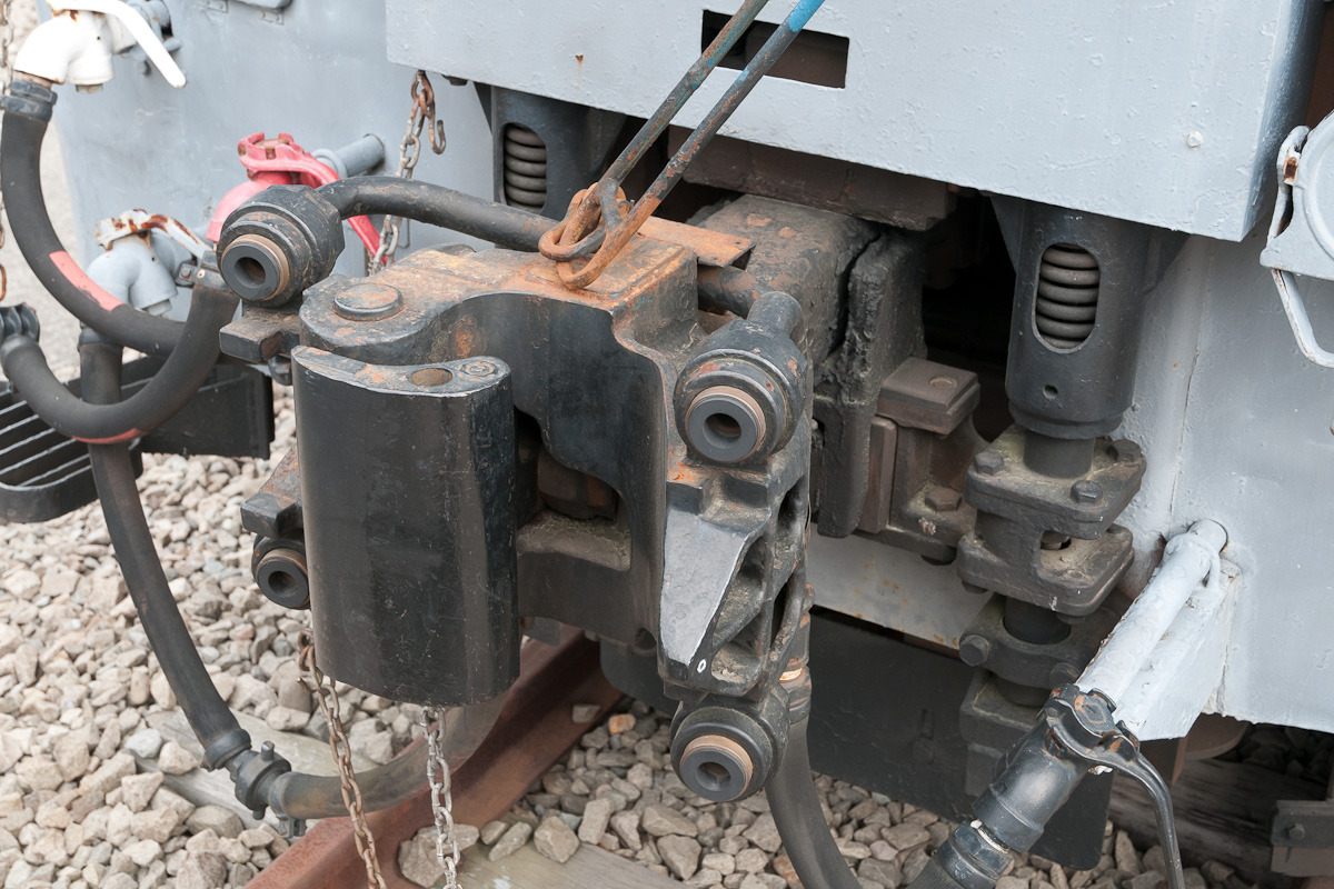 EF65520（F形）の空気管付き自動密着連結器。碓氷鉄道文化村の保存車。